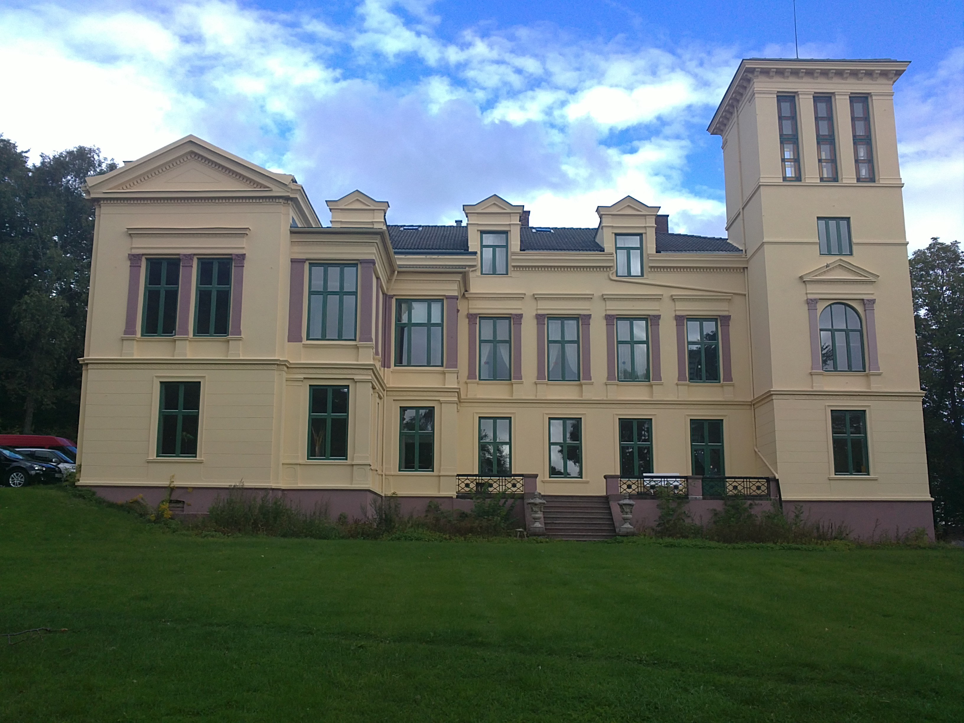 Bilde av Nedre Nanset